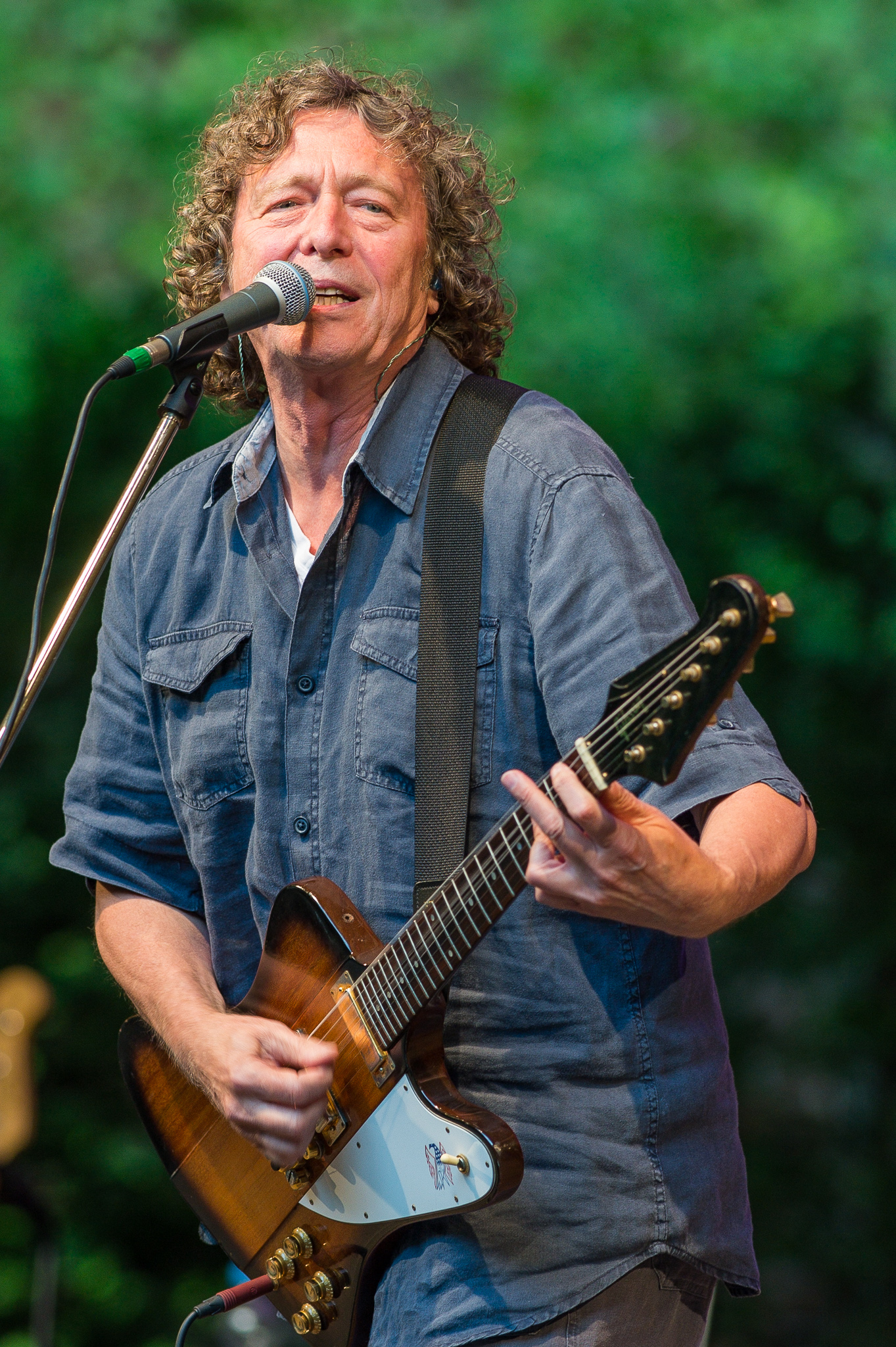 Concertbüro Franken,Konzert,Livekonzert,Livemusik,Musik,Peter Cornelius,Peter Cornelius Korunka,Serenadenhof